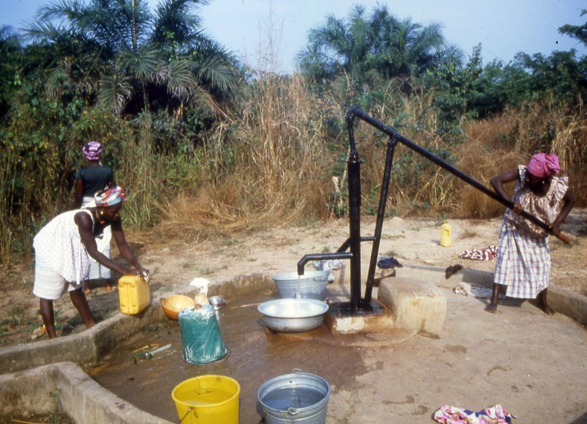 Verbeterde watervoorziening in ruraal Guinée-Bissau (regio's Quinara en Tombali) door levering waterpomp in hygienische condities; foto genomen rond 1980.